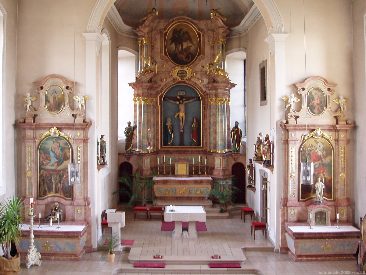 Kath. Kirche St. Michael in Erlenbach-Binswangen